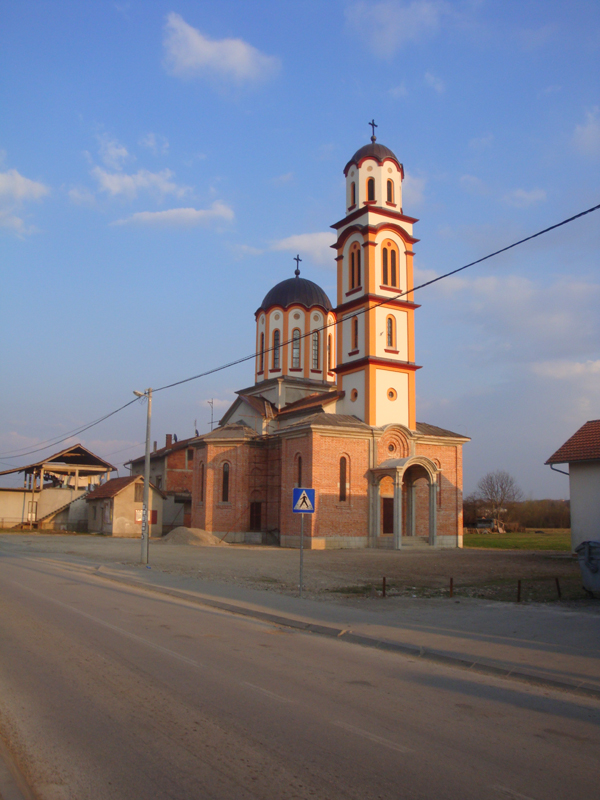 Православна црква у Драгочају